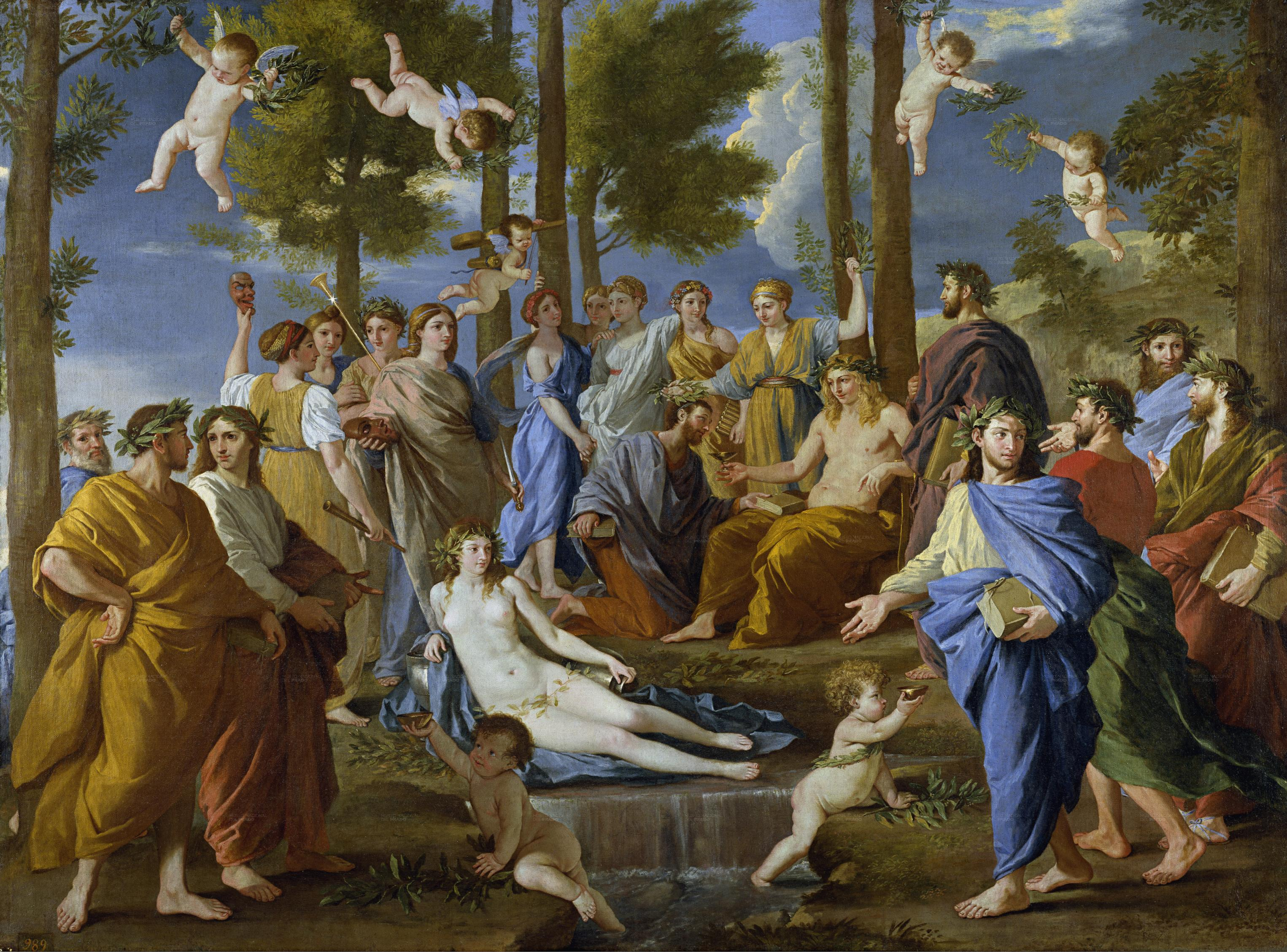 Parnassuslabel QS:Les,"El Parnaso" label QS:Len,"Parnassus"